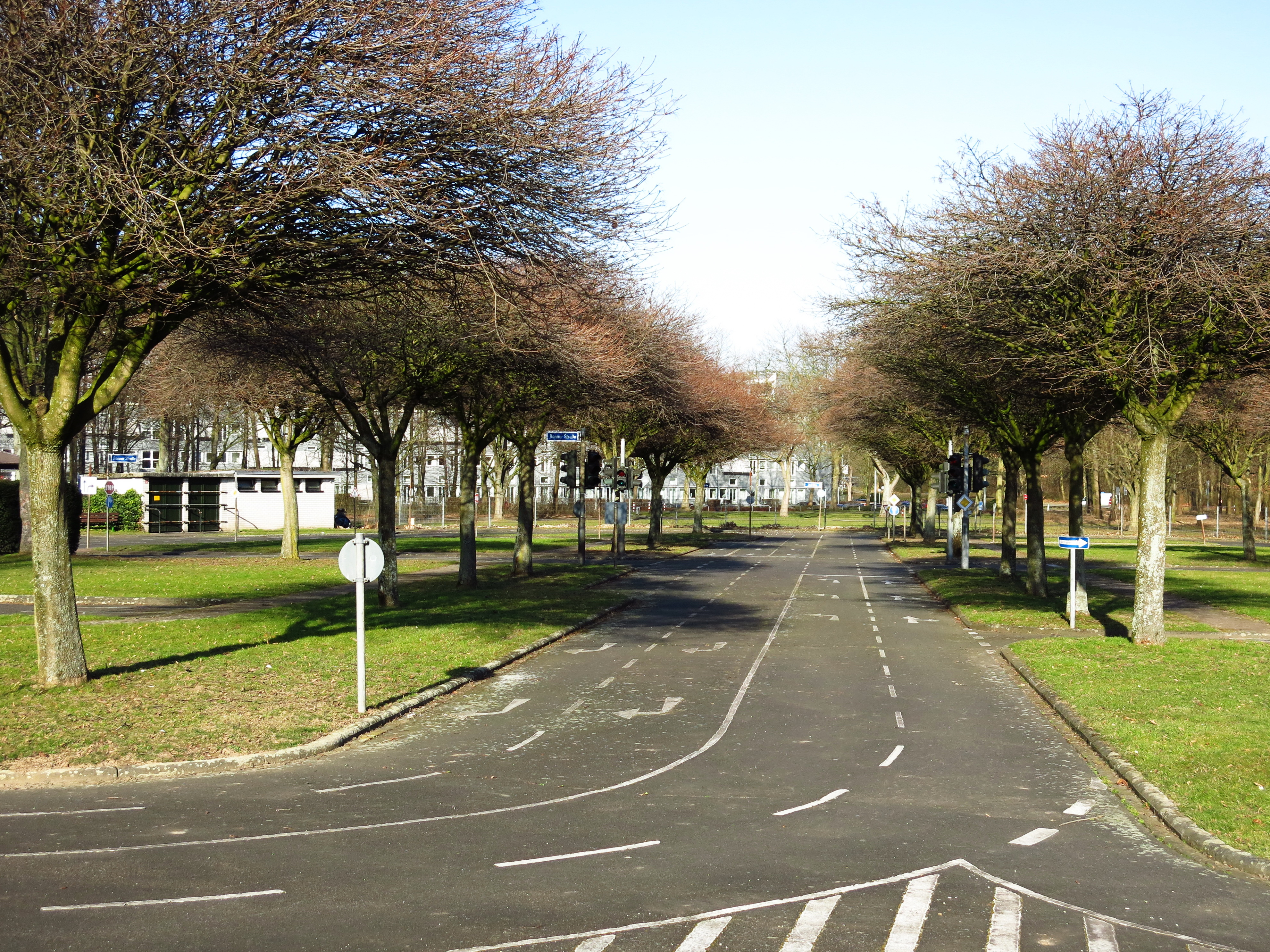 Jugendverkehrsschule Bonn